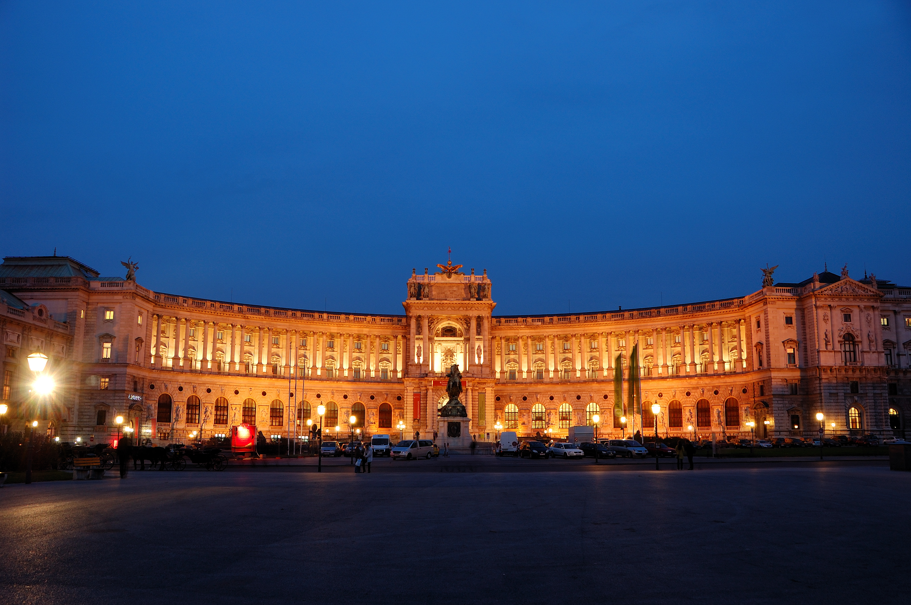 Neue Burg, Nationalbibliothek (heutiger Lesesaal)